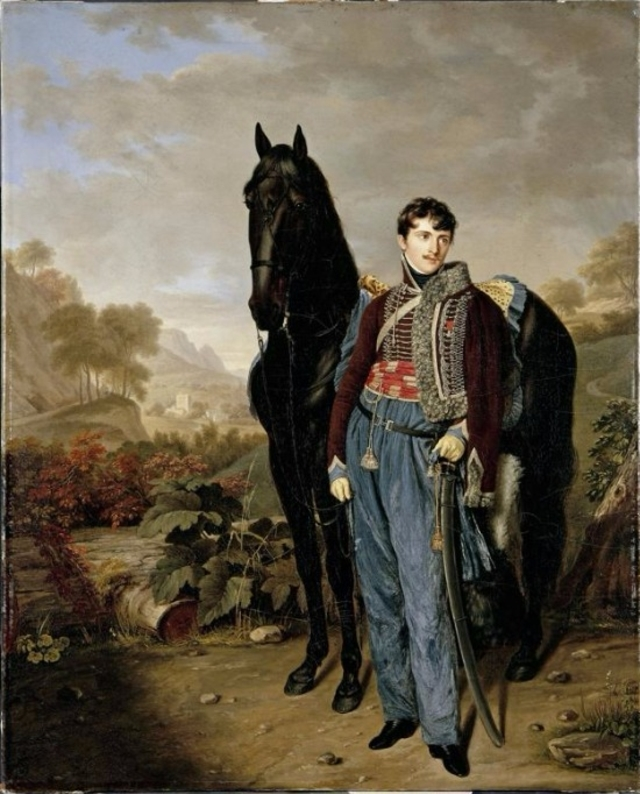 Portrait d'Albert Jean Michel Rocca. Huile sur toile de Pierre-Louis Bouvier, Genève, Musée d'art et d'histoire, vers 1816.